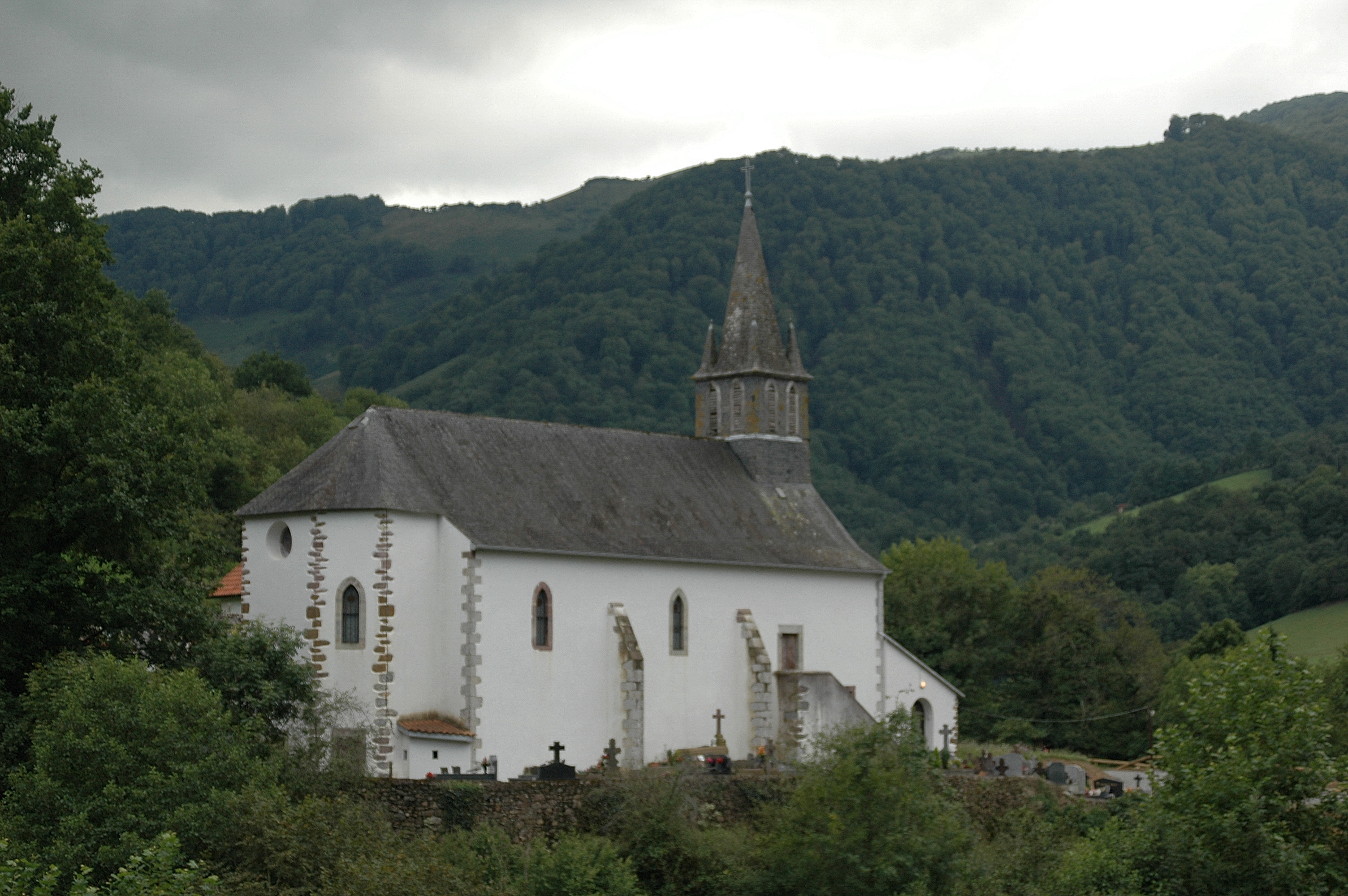 Estérençuby, l'église Notre-Dame